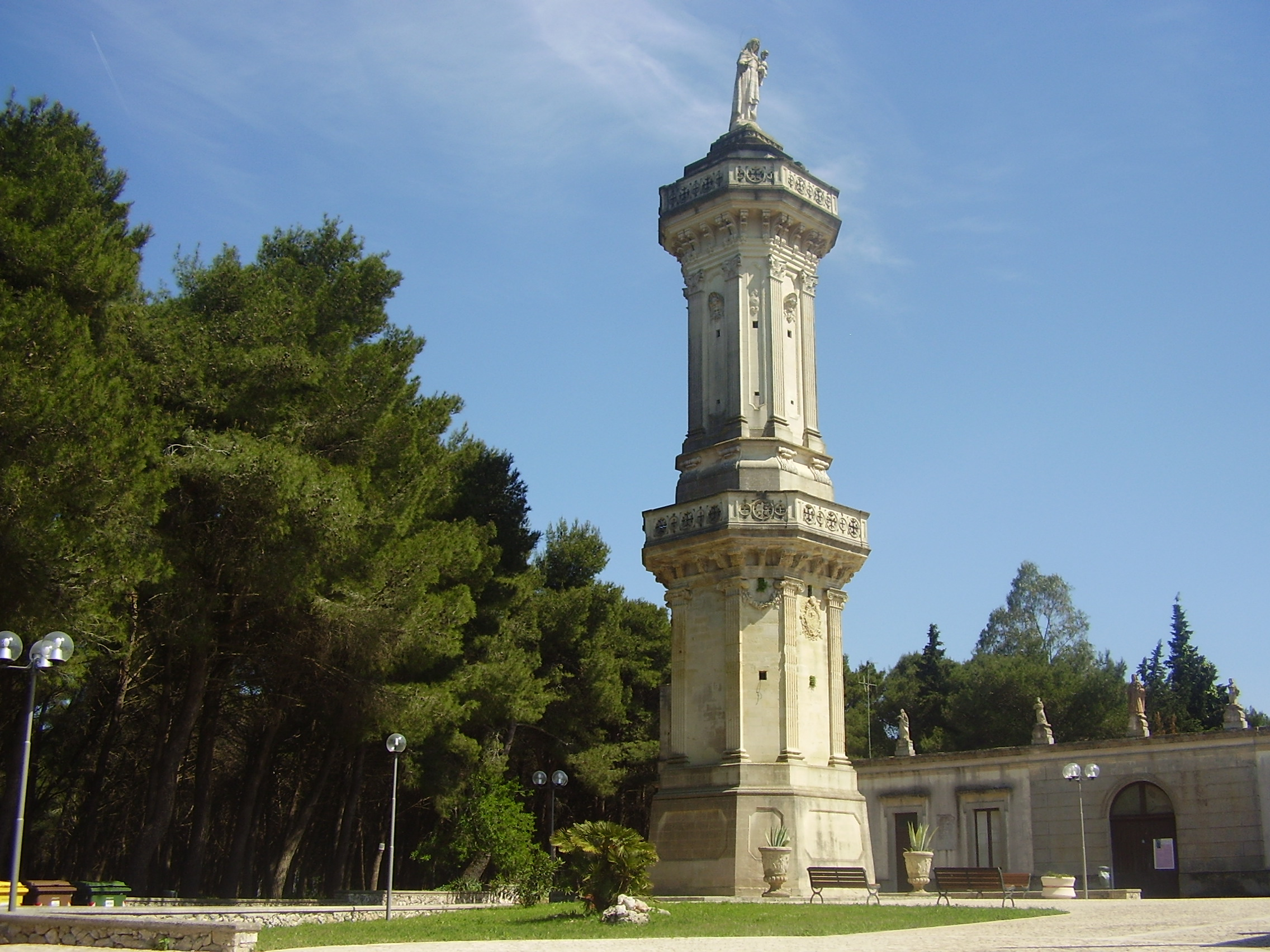 Guglia Montevergine Palmariggi